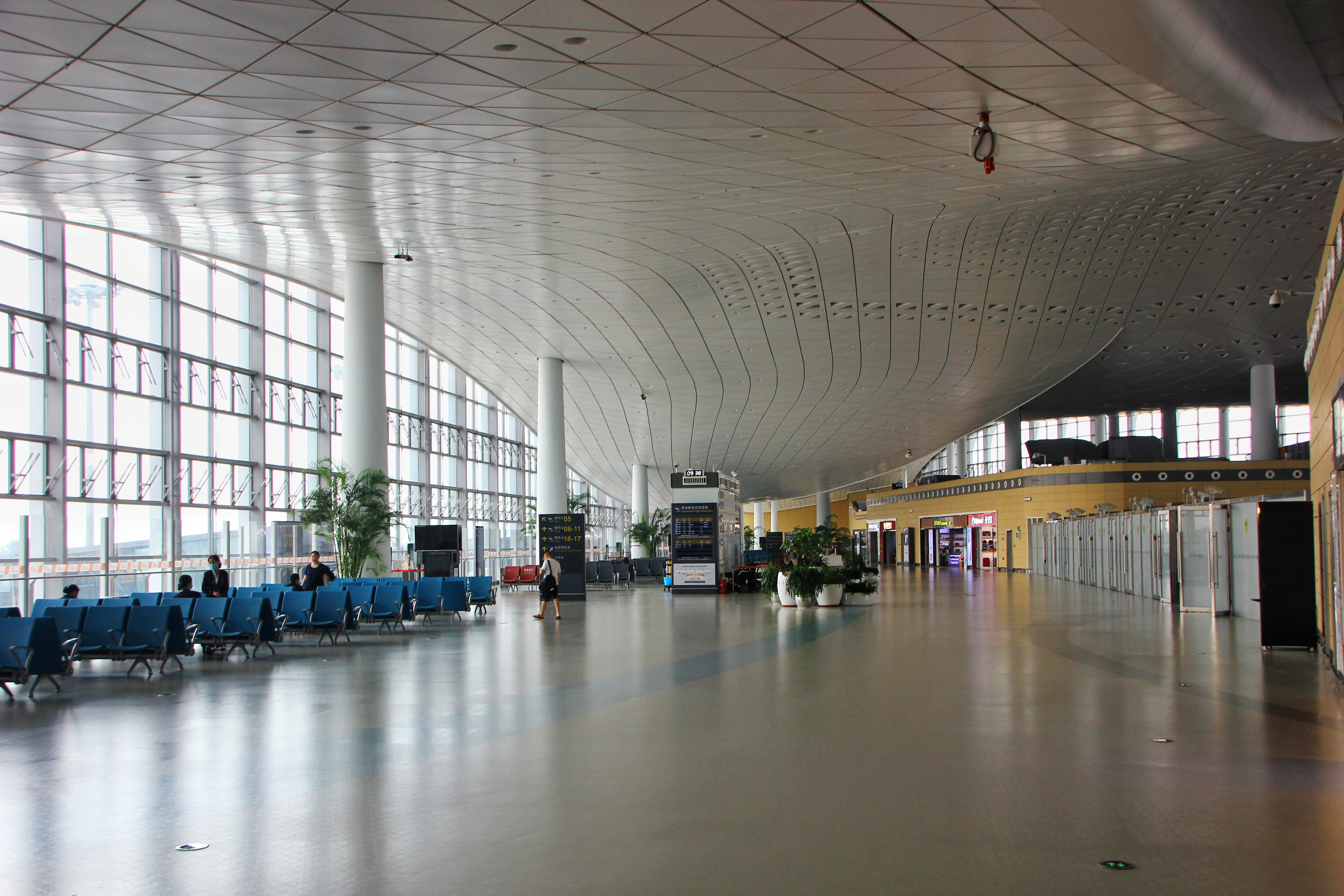 中文（中国大陆）: 徐州观音机场航站楼